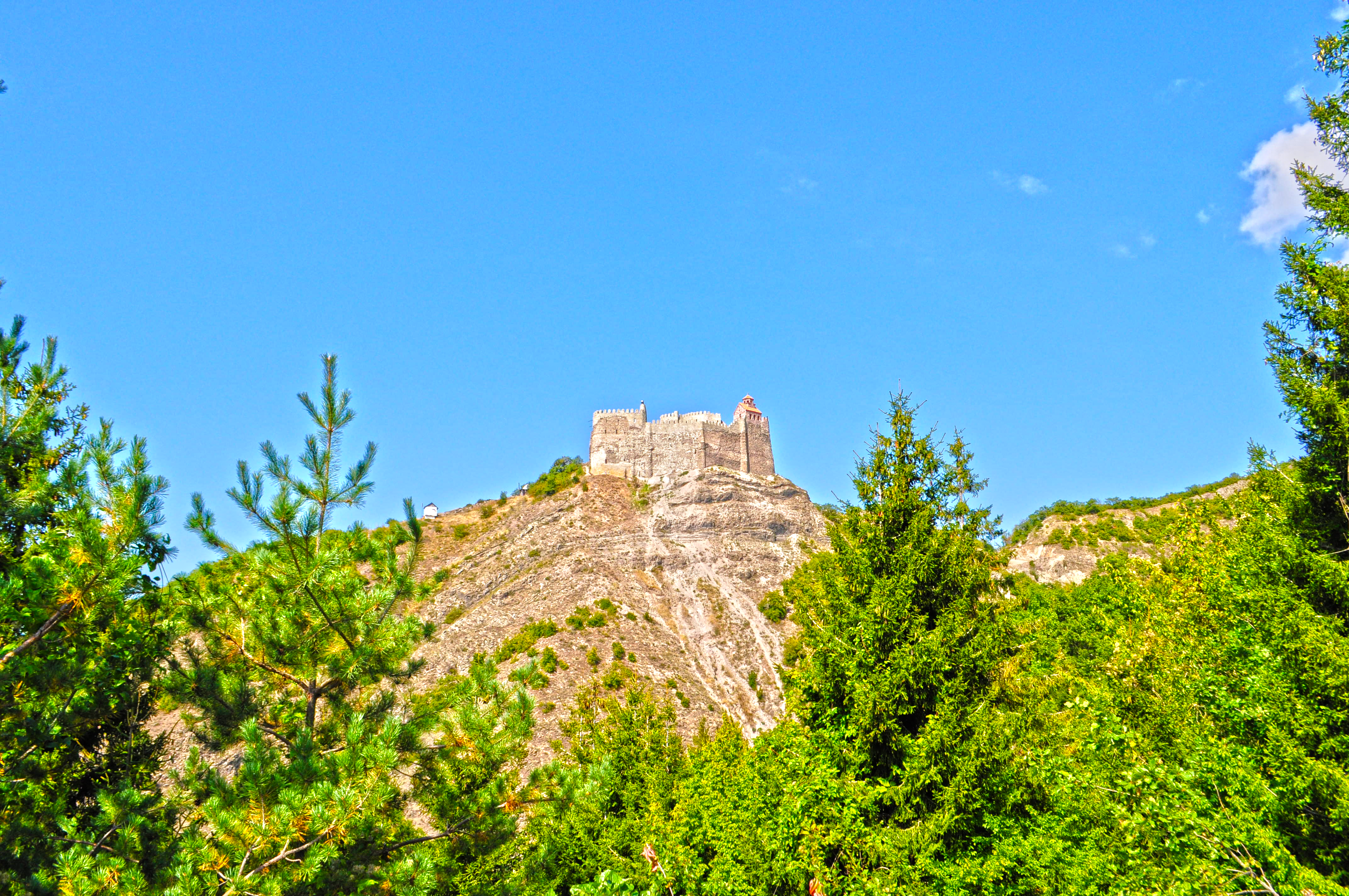 მძოვრეთის ციხე